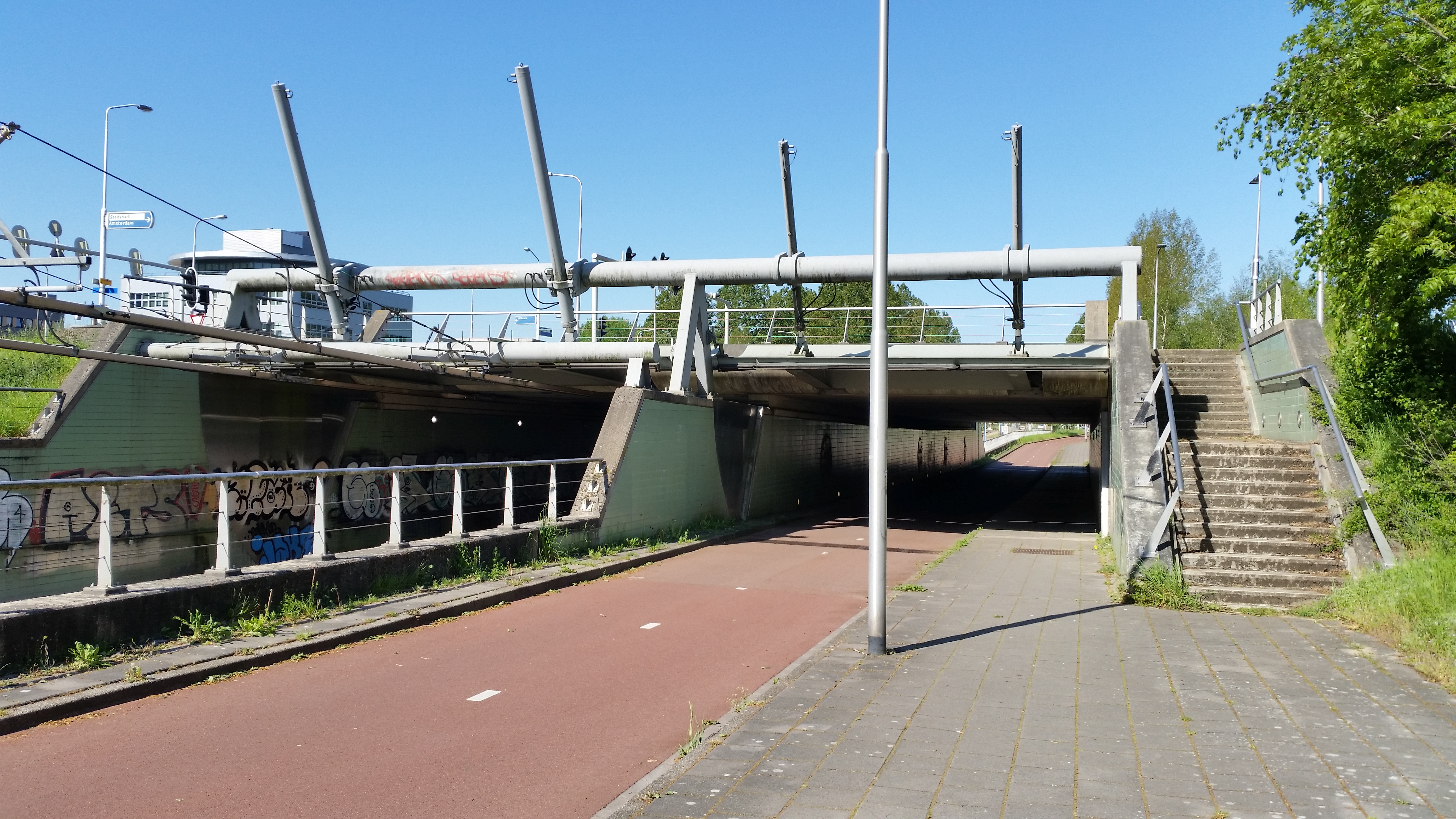 Viaduct in de Bovenkerkerweg over de Amstelveenlijn; Amstelveen inclusief coupure (april 2020)